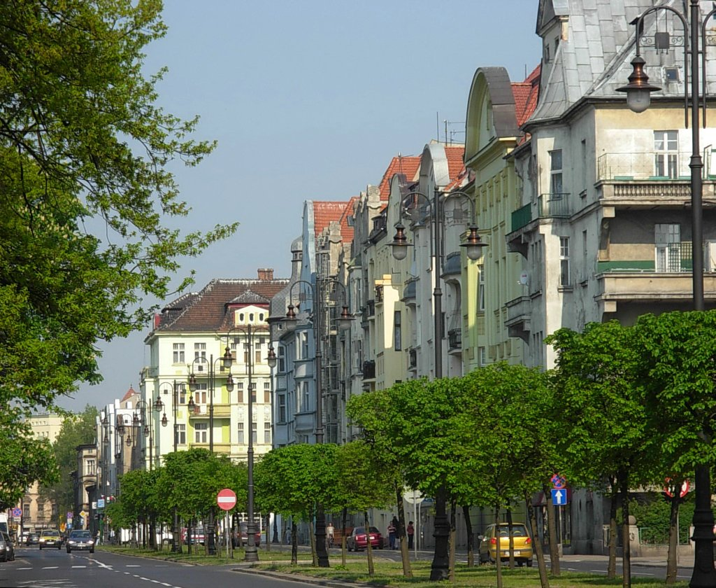 Aleje Mickiewicza w Bydgoszczy